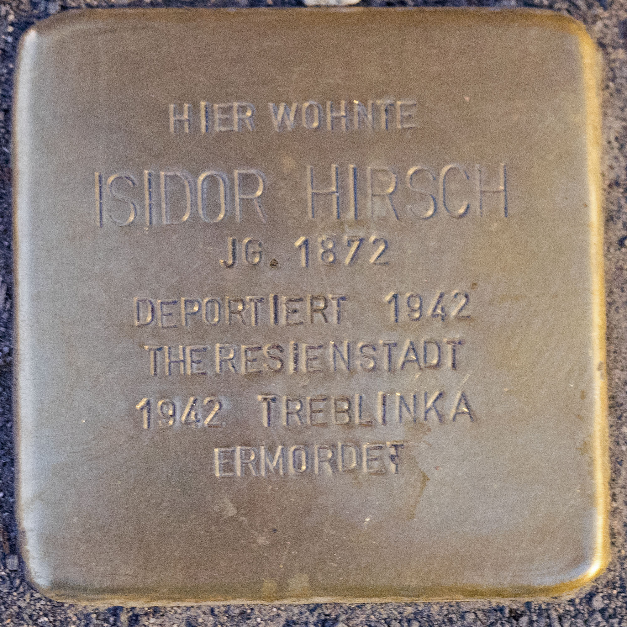 2016 11 25 Stolpersteine Kempen Hirsch Isidor